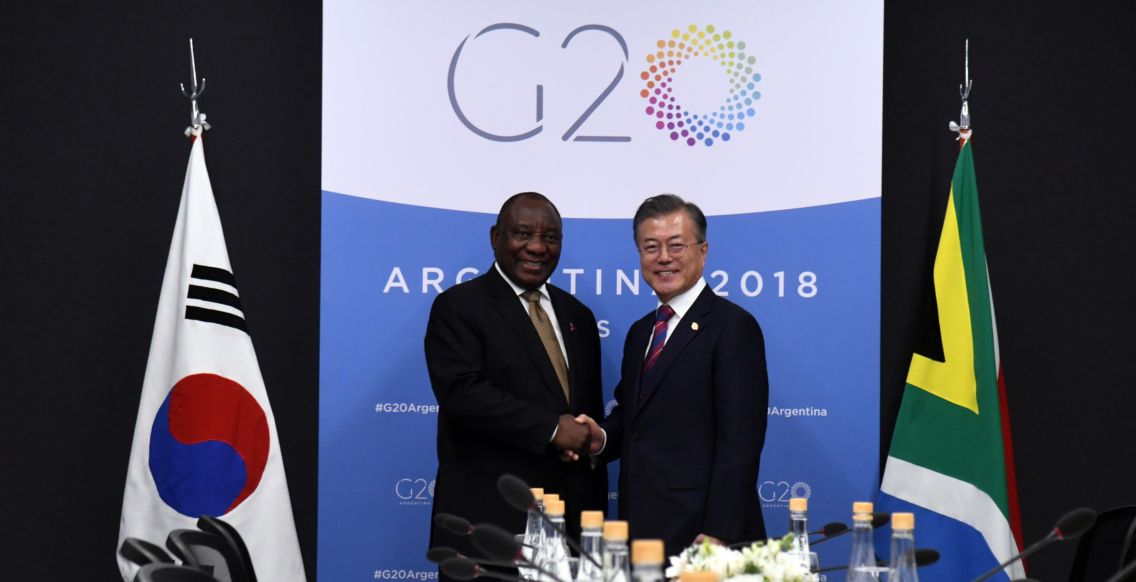 Reunión Bilateral - Cyril Ramaphosa y Moon Jae-in